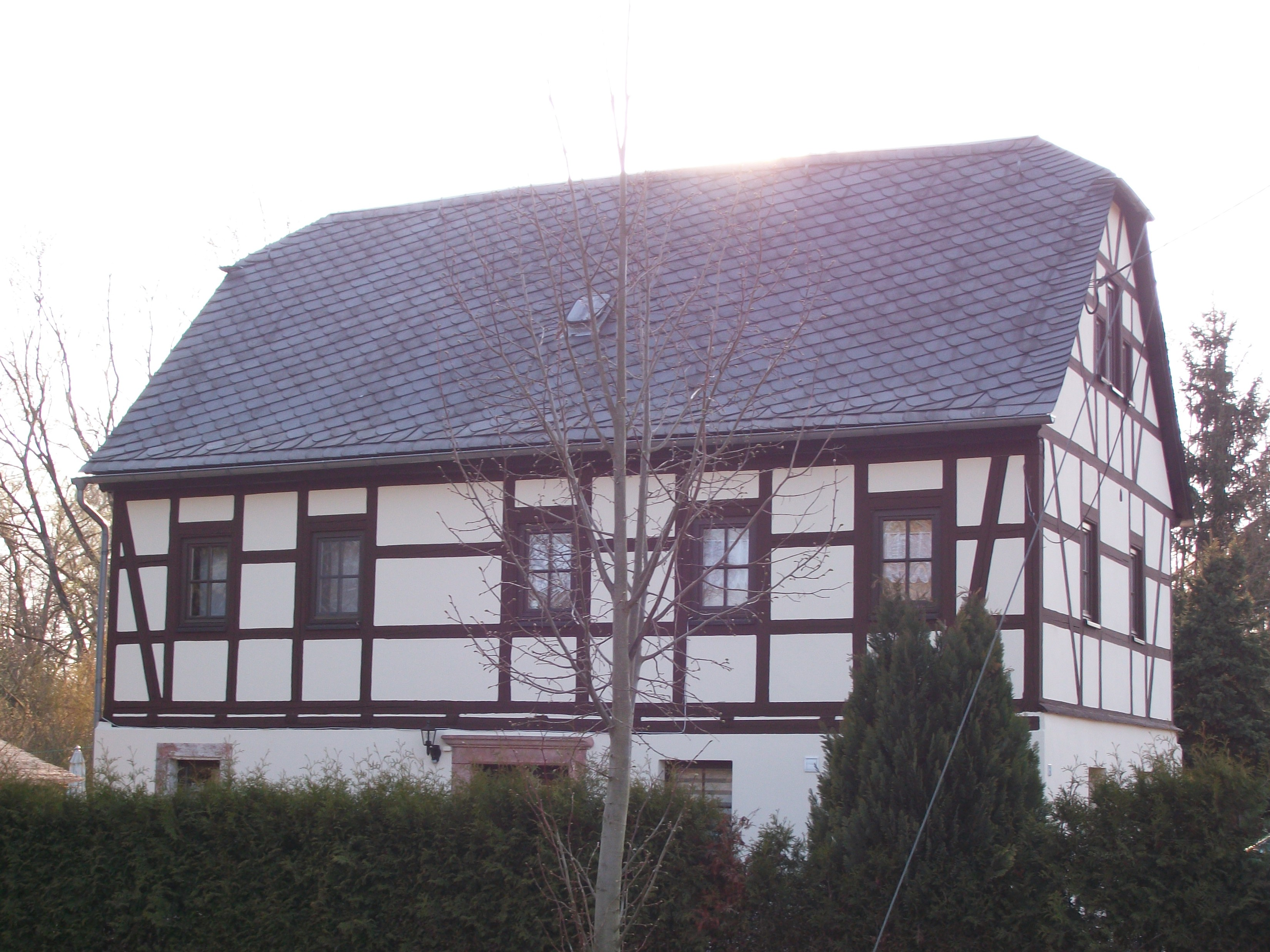 Thalheim (Mittweida), Topfseifersdorfer Straße 25